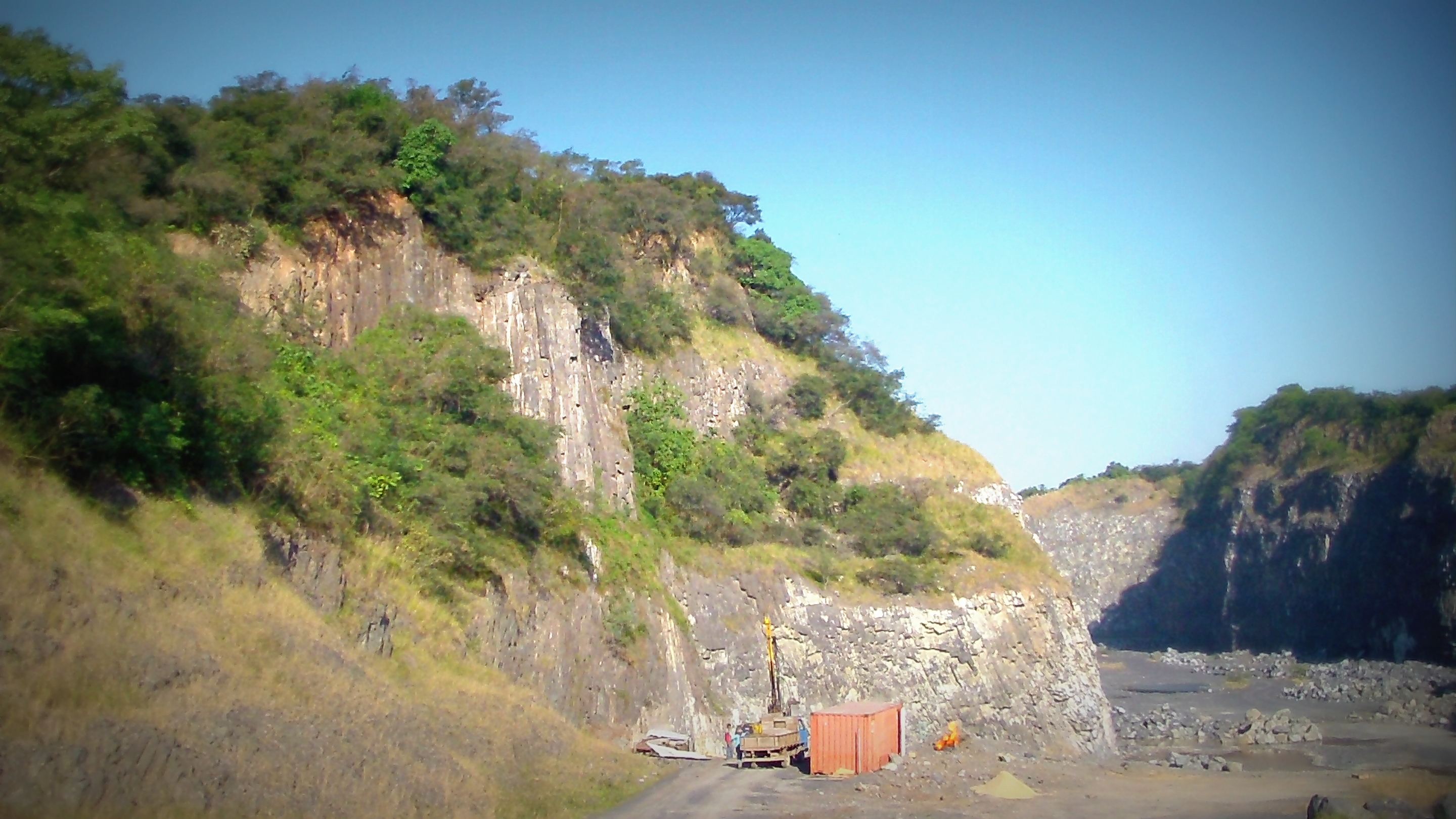 Dinamitando el Cerro Ñemby 2012